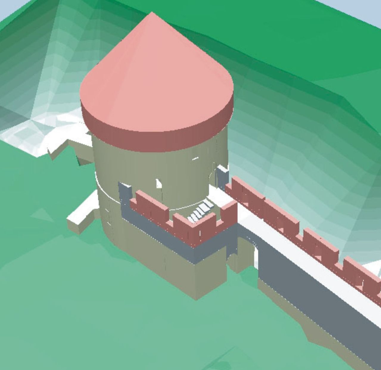 Cette représentation virtuelle du donjon du Coudray (forteresse royale de Chinon) permet de mieux comprendre le système défensif voulu par Philippe Auguste. Protégé successivement par un pont-levis, une herse, une porte très résistante accessible uniquement via un escalier ainsi qu'un assommoir, le donjon du Coudray représente l'apogée de l'architecture militaire médiévale.